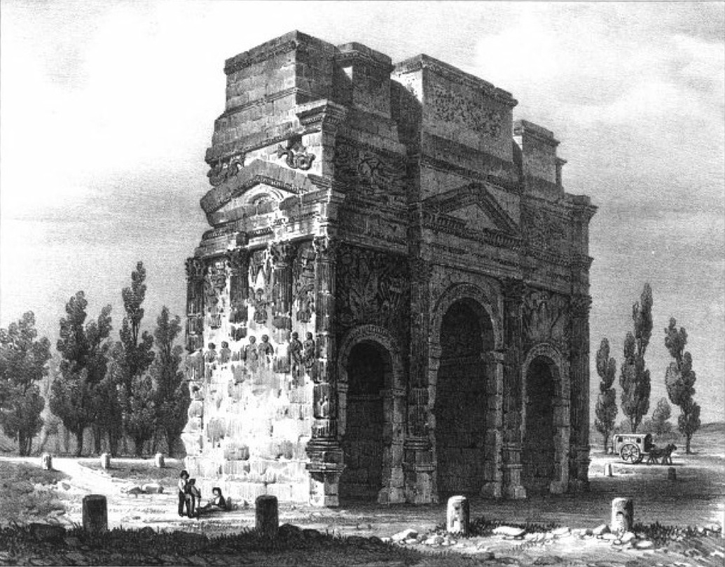 Album du Dauphiné - tome IV, litographie de l'Arc Romain, Orange